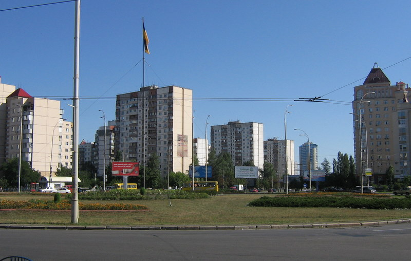 Площа Загороднього в Києві